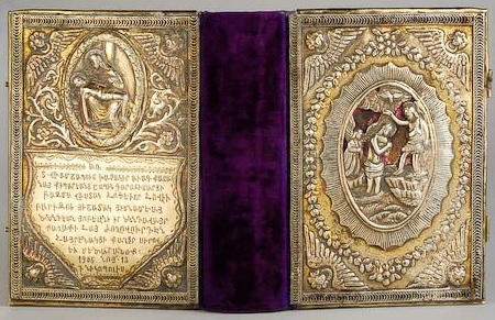 Оклад "Маштоца" 1905 года